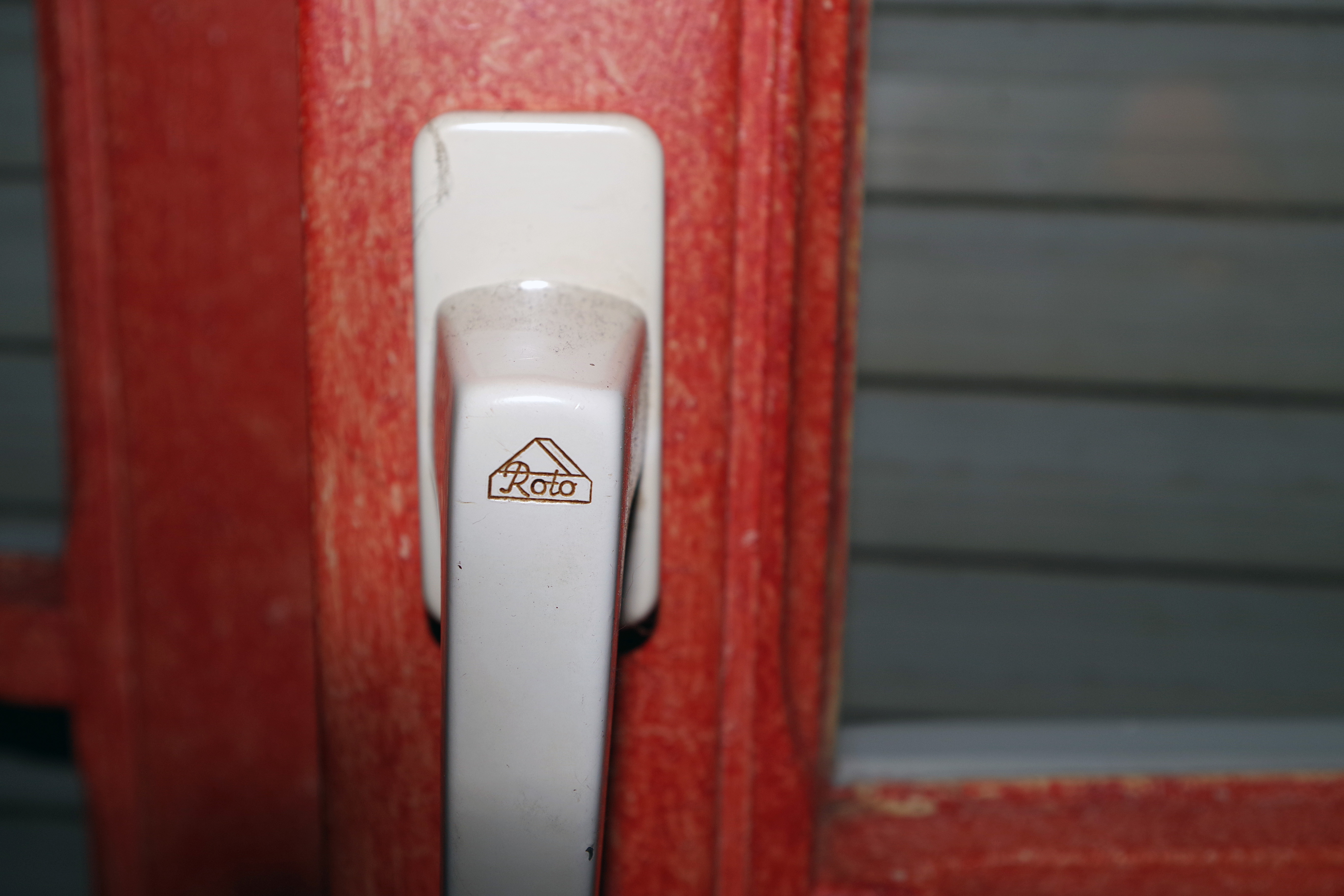 FensterGriff (ROTO)